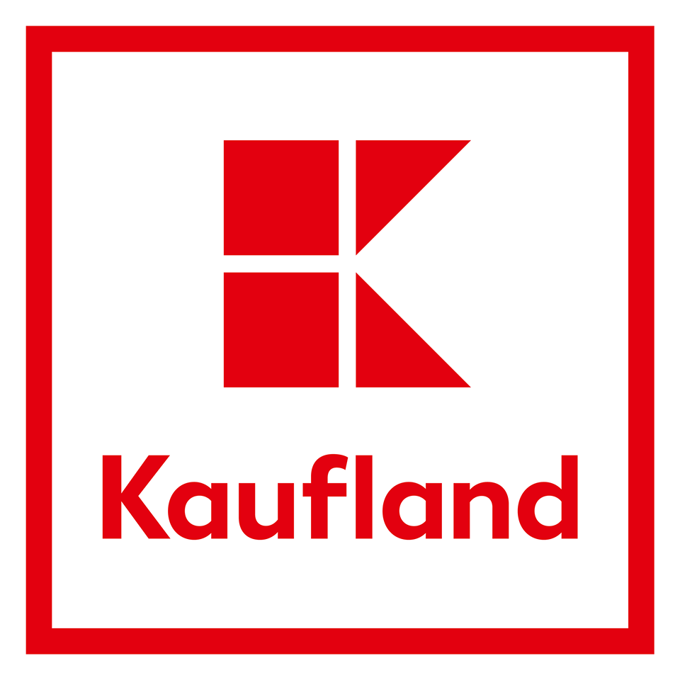 Kaufland Logo neu